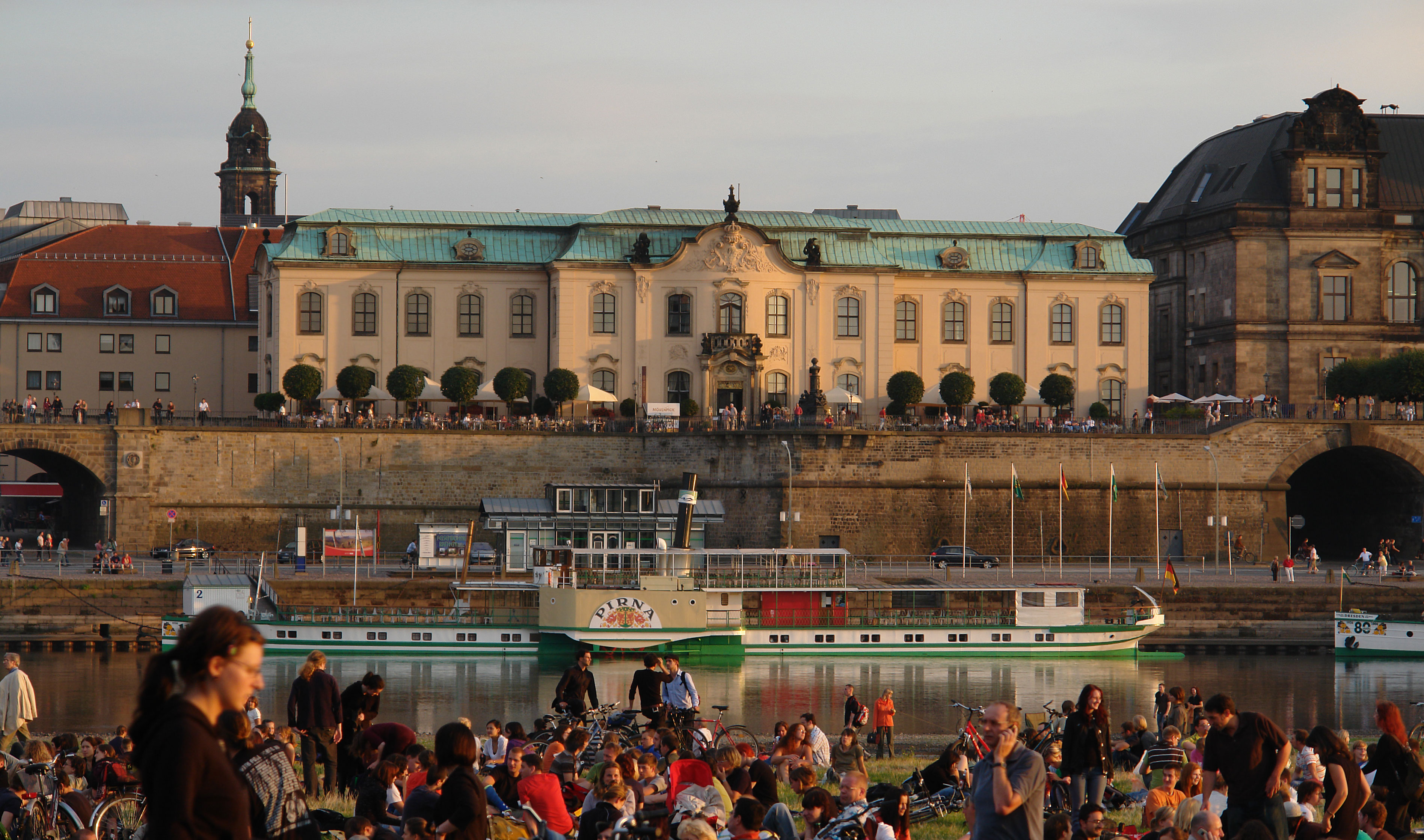 Sekundogenitur vor dem R.E.M. Konzert 2008